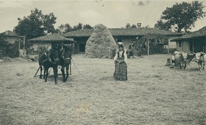 Вършитба в с. Подвис, Бургаско.